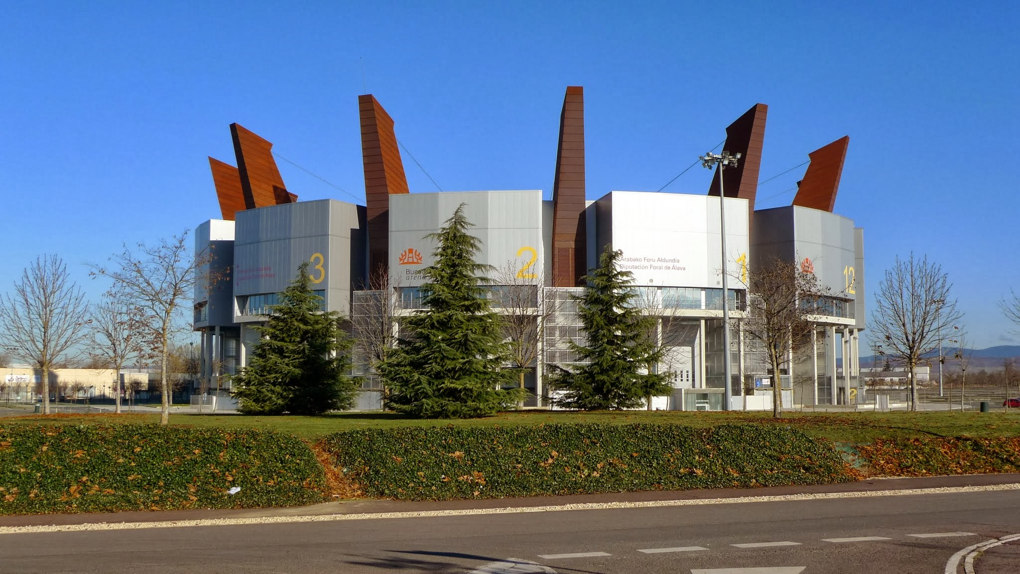 Pabellon Fernando Buesa Arena